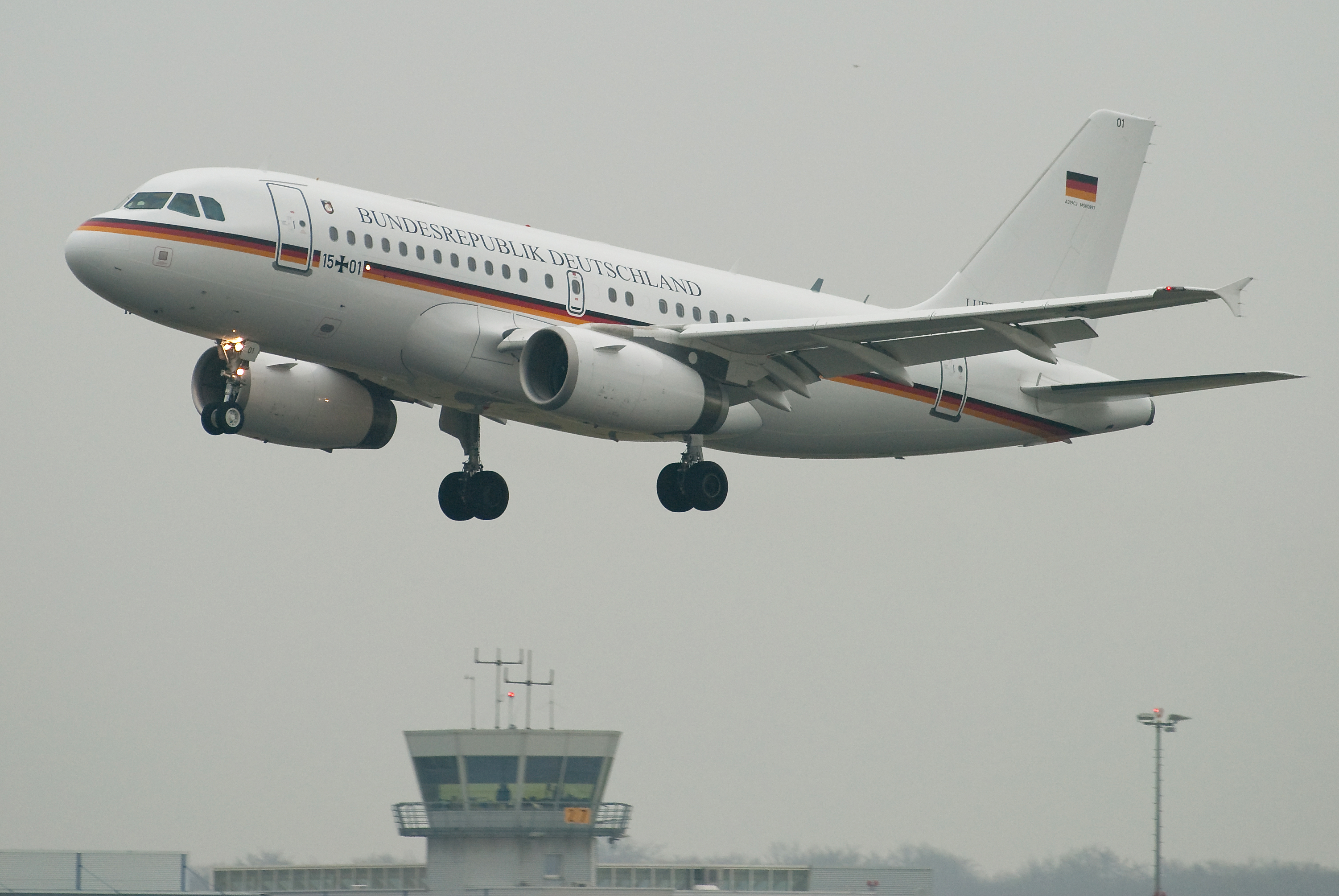 Airbus A319CJ Bundesrepublik Deutschland 15+01